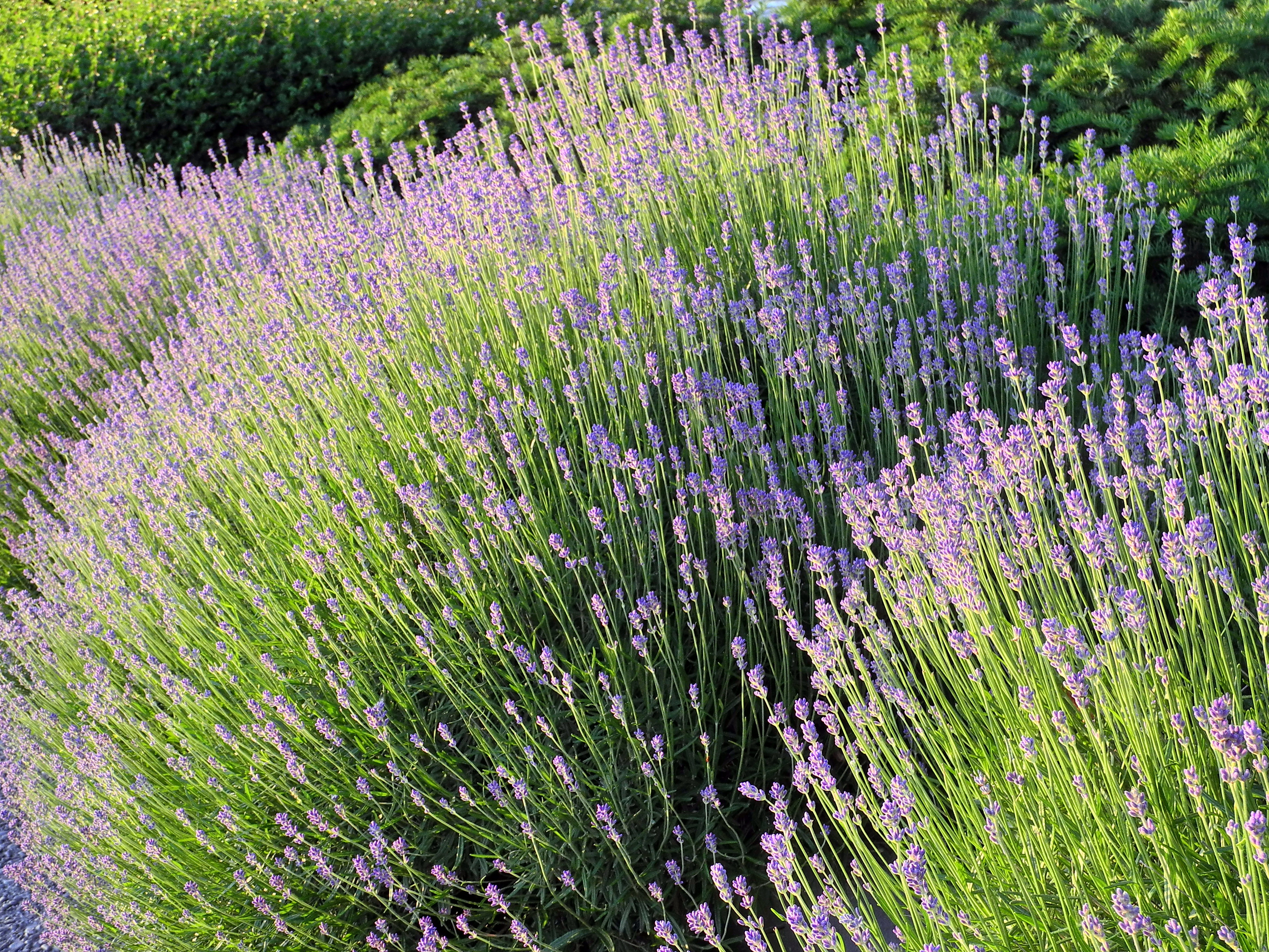 Utoquai in Zürich (Switzerland)